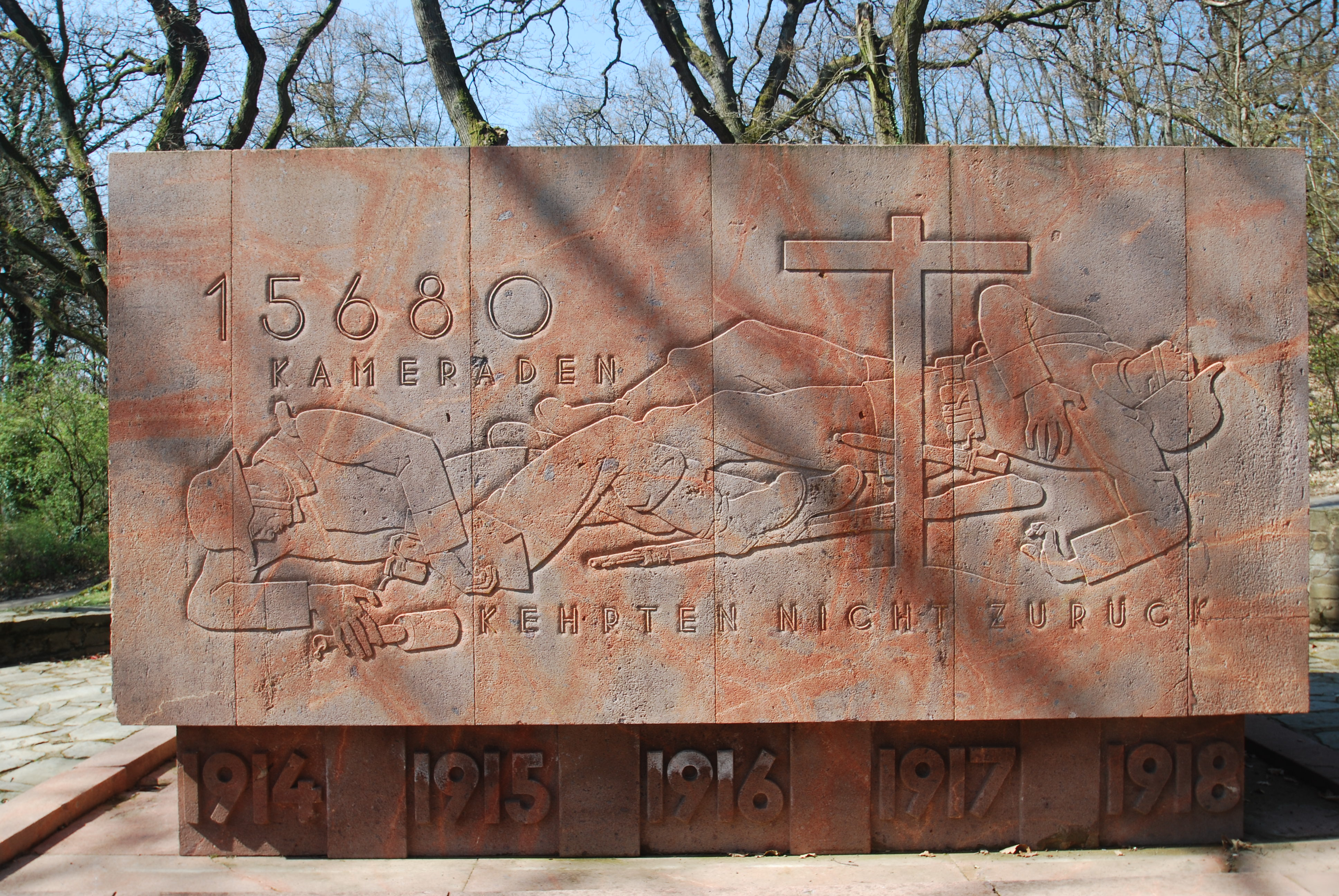 Ehrenmal für im Ersten Weltkrieg Gefallene des Füsilier-Regiments von Gersdorff Nr. 80 von Arnold Hensler von 1930 auf dem Neroberg in Wiesbaden